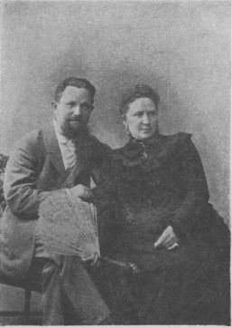 Георгий Ленов, внук Сергей Ленова, основателя шоколадно-кондитерской фабрики в Москве «Торговый дом Леновых» и его жена Екатерина Сергеевна